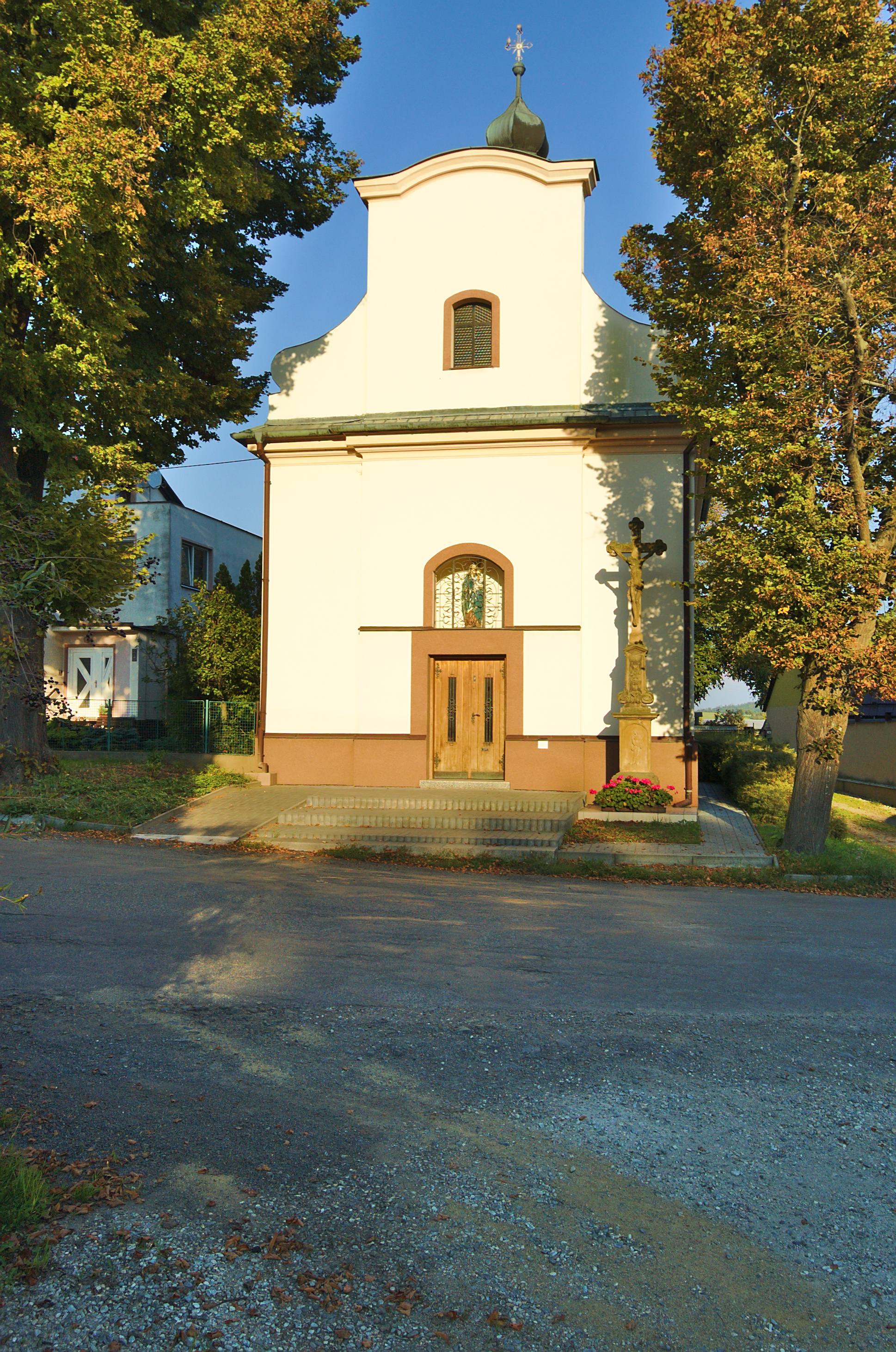 Kaple Navštívení Panny Marie, Pěnčín, okres Prostějov